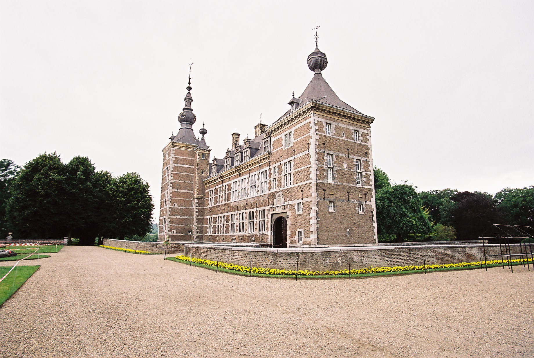 Kasteel Eijsden te Eijsden.